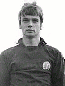 Title: XXIV. UEFA-Turnier, DDR-Fußball-Juniorennationalmannschaft Factual corrections and alternative descriptions are encouraged separately from the original description. Additionally errors can be reported at this page to inform the Bundesarchiv. Original historic description: Zentralbild-Mittelstädt-19.5.71-ma-Berlin: XXIV. UEFA-Turnier der Fußball-Junioren vom 22. bis 30.5.71 in der CSSR. Die DDR-Kandidaten v.l.n.r.: Bernd Jakubowski, Bernd Wargos, Peter Fritzsche (alle Torwart), Udo Schmuck, Rüdiger Schnuphase, Wolfgang Rahn, Wolfgang Altmann, Detlef Kranz, Axel Tyll, Jürgen Pommerenke, Matthias Blaseck, Dietrich Kehl, Albert Ullrich, Norbert Schumann, Bernd Tramp, Detlef Robitzsch, Klaus Müller, Ekkehardt Märzke und Waldemar Köppe. Nicht nominiert wurden die Spieler Fritzsche, Blaseck und Ullrich.